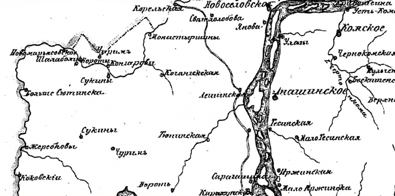 Карта